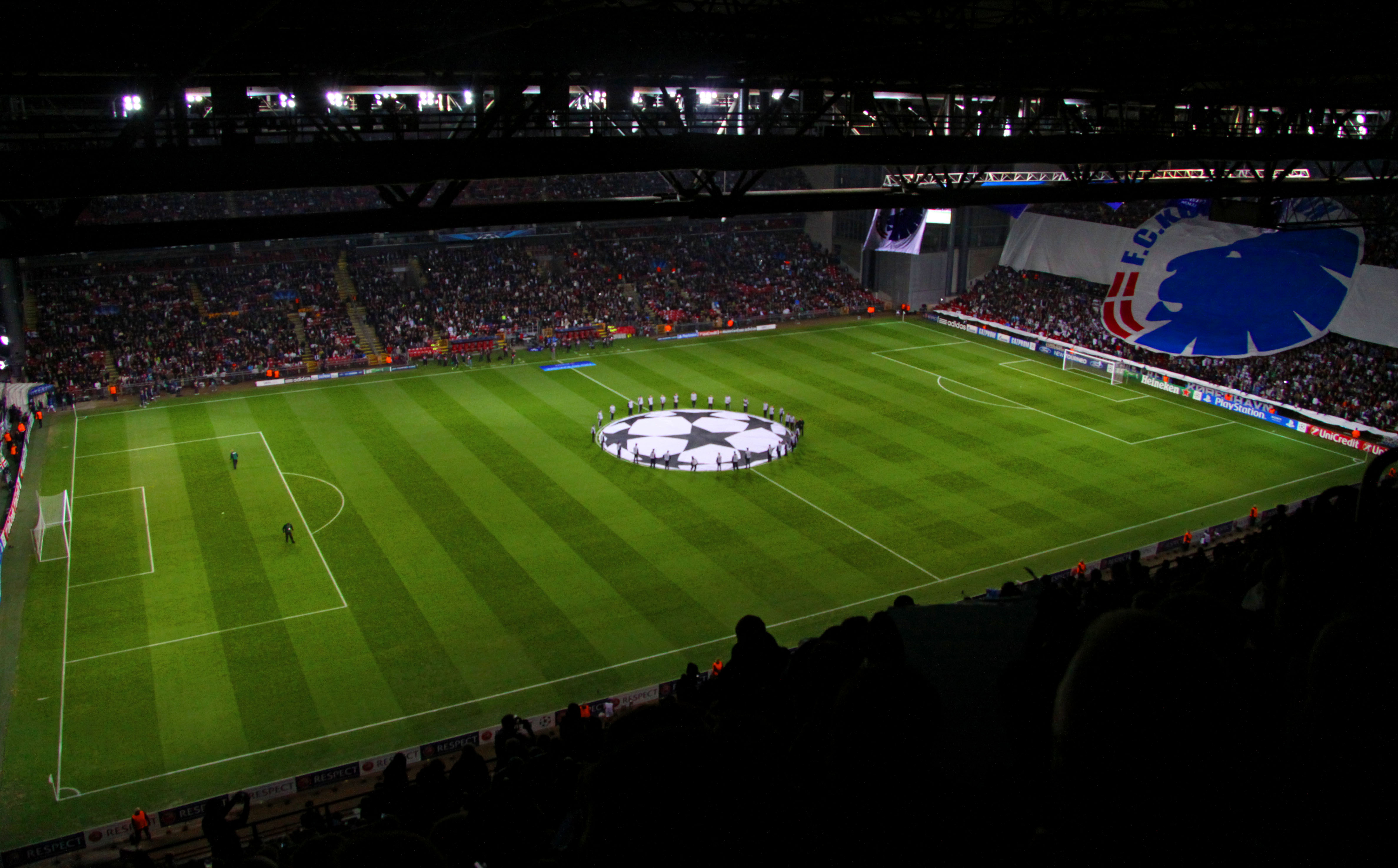 København / Copenhagen. Champions League, FC København - Juventus på Parken.